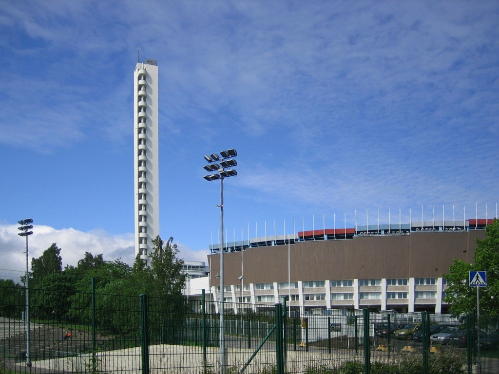 Helsingin olympiastadion.